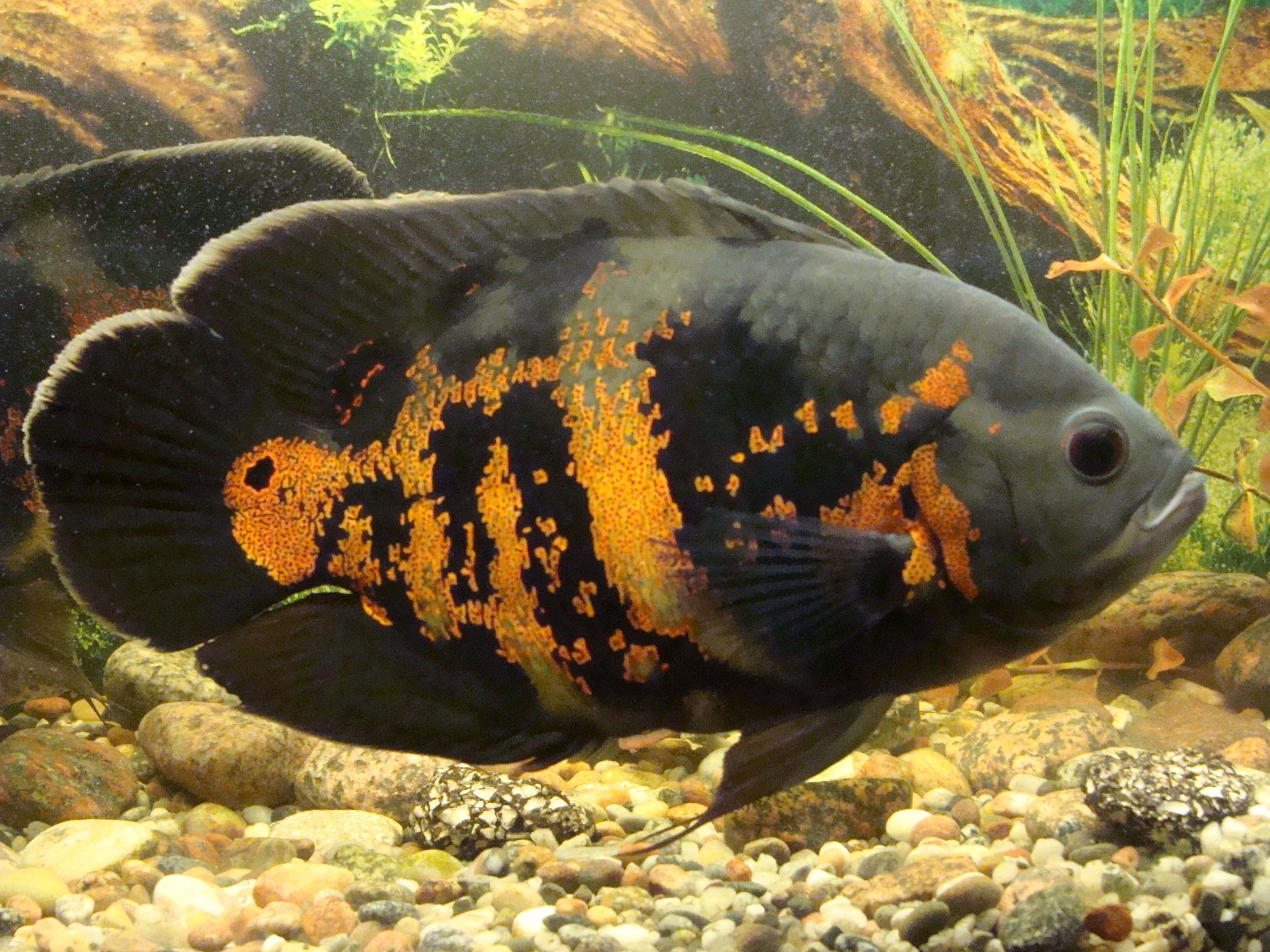 Pielęgnica Pawiooka Red Tiger Oscar